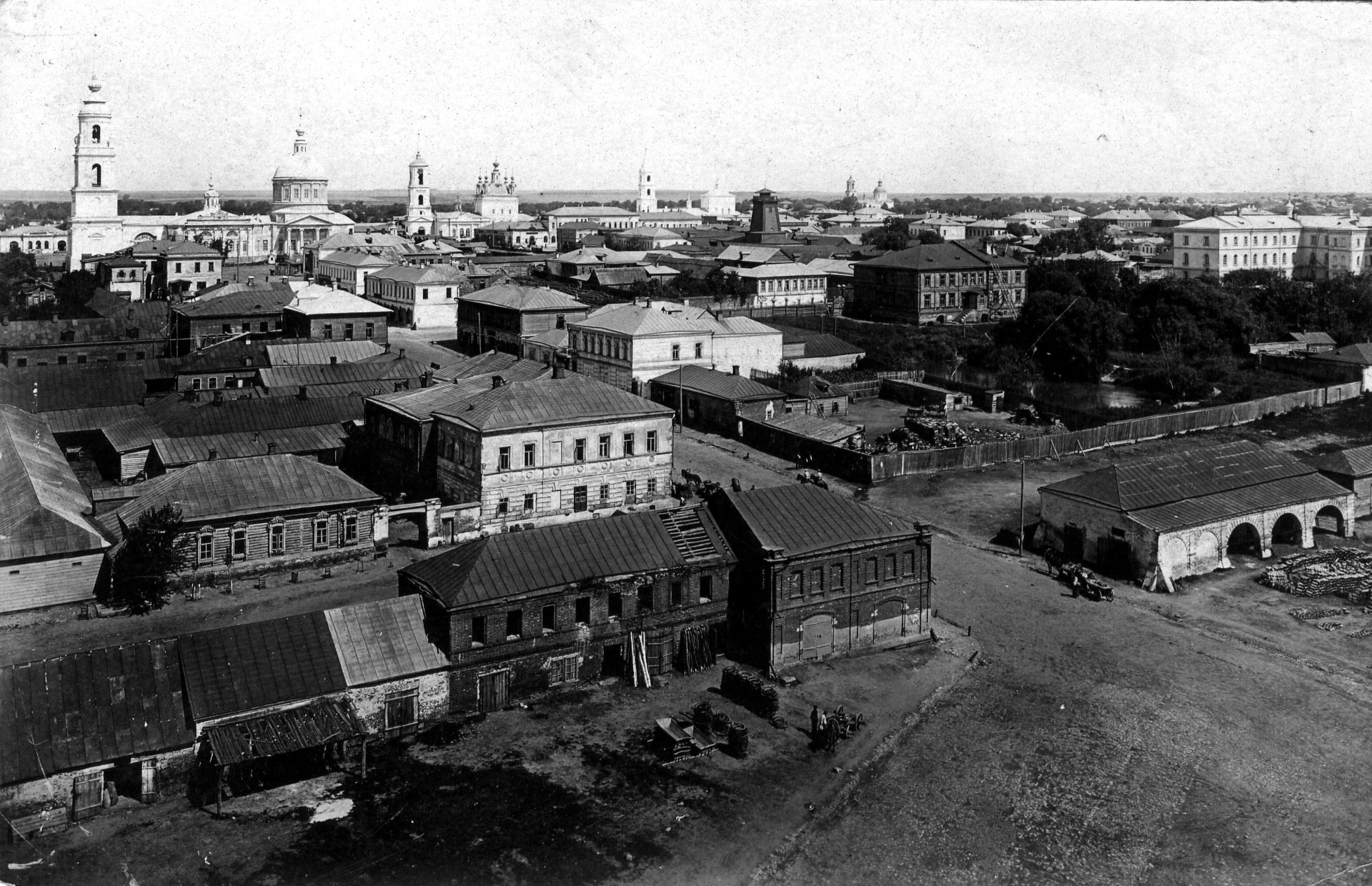 Центр г.Скопина Рязанской области по состоянию на начало 20 века (вид с колокольни Покровской церкви)